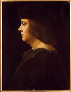 Lucien Grimaldi attribué à Ambrogio de Predis Collection du Palais Princier de Monaco